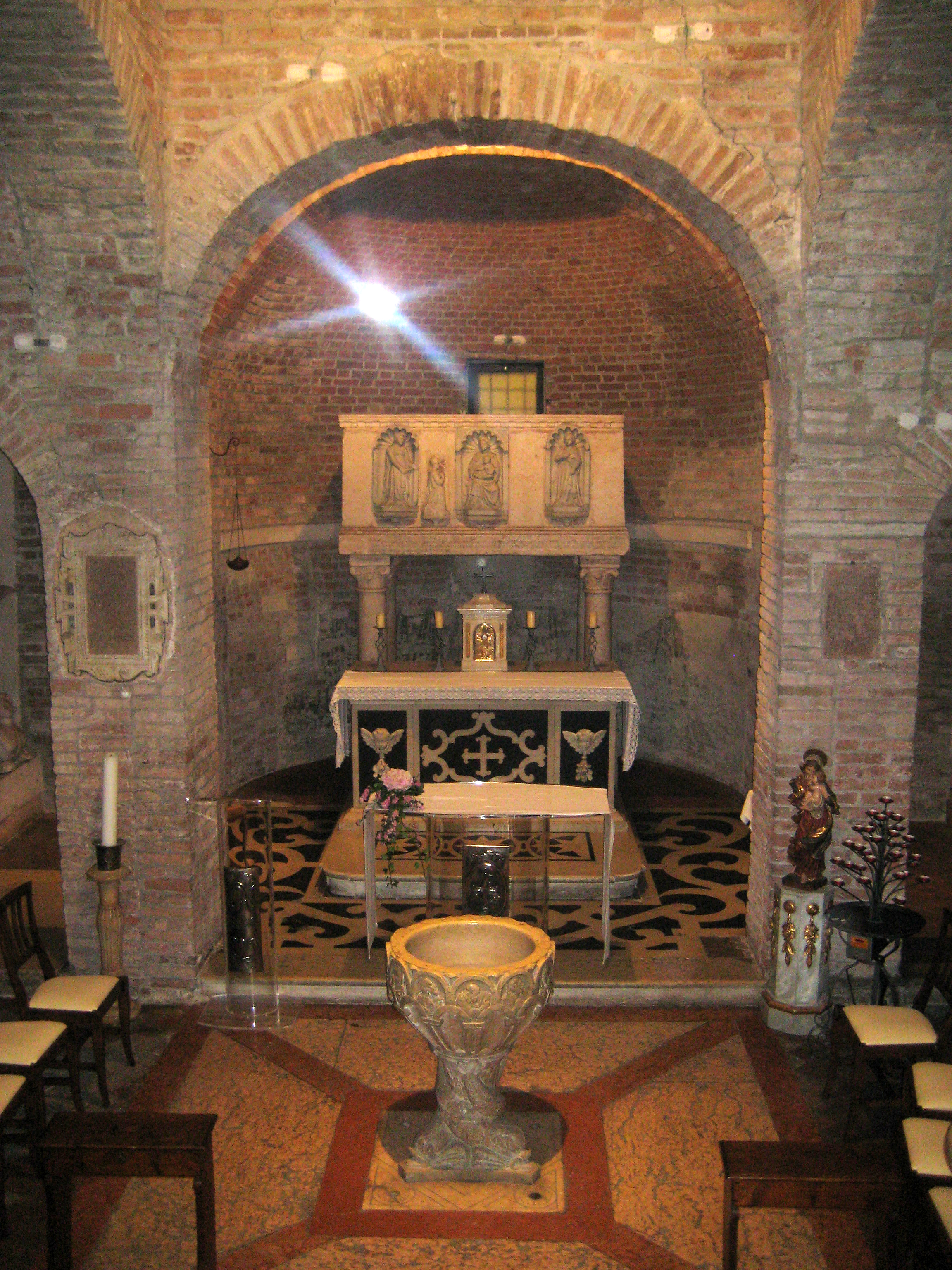 Interno della Chiesa delle Sante Teuteria e Tosca